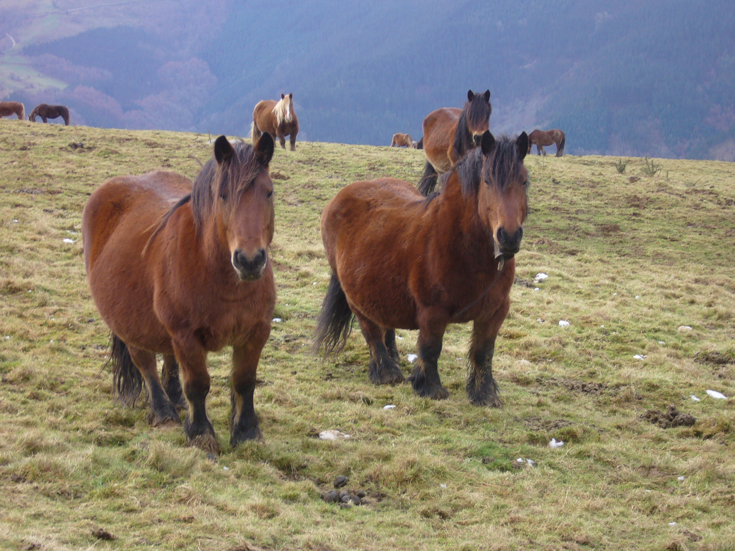 Euskal Herriko mendiko zaldia arraza. Bi behor Pagoetako Parke Naturalean